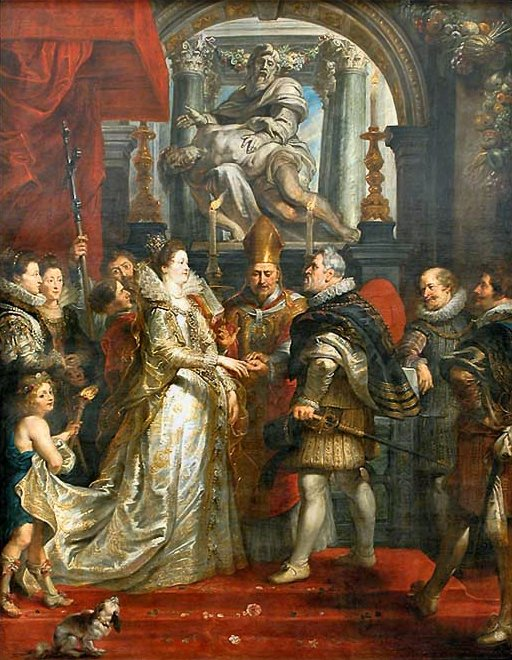 Gemäldezyklus für Maria de' Medici, Königin von Frankreich, Szene: Vermählung Heinrich IV. und der Maria de' Medici in Florenz